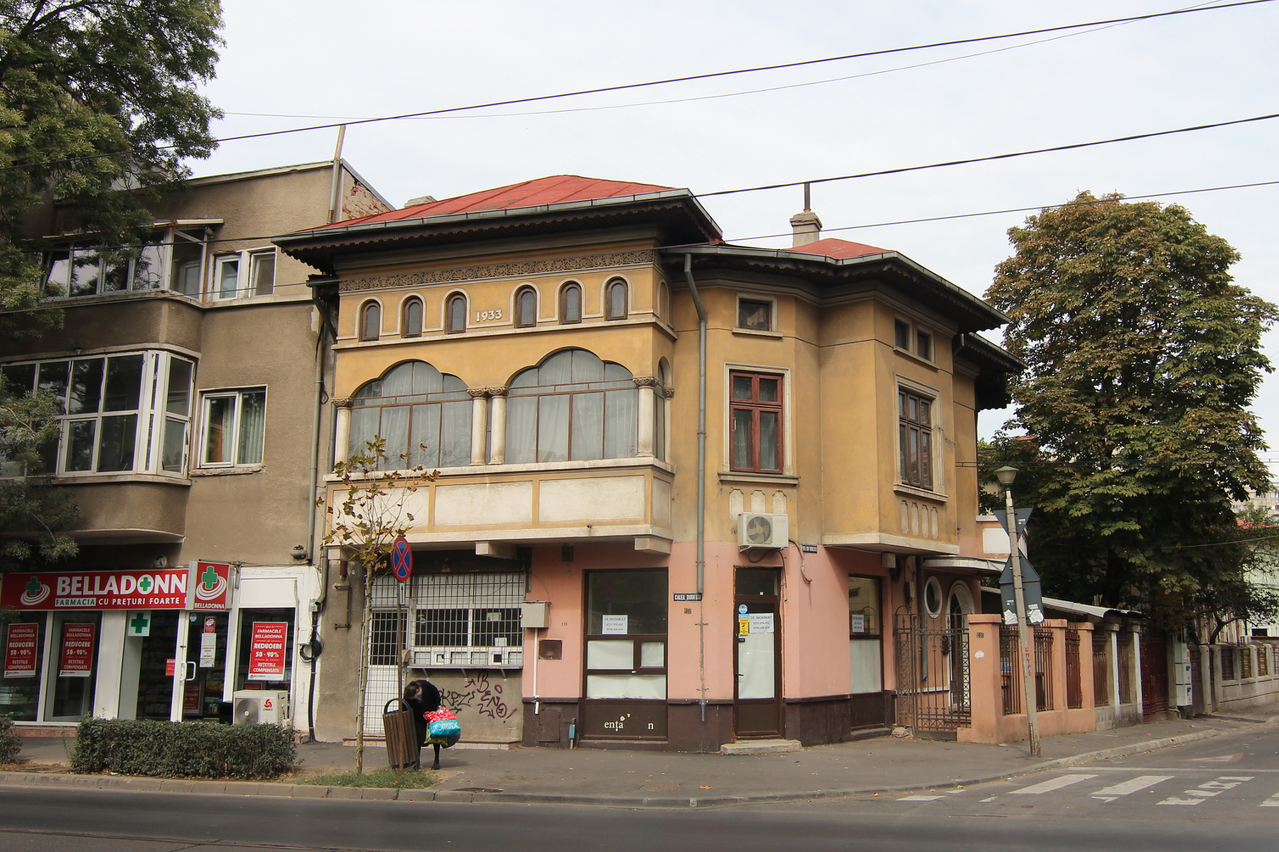 Casă pe Dudești